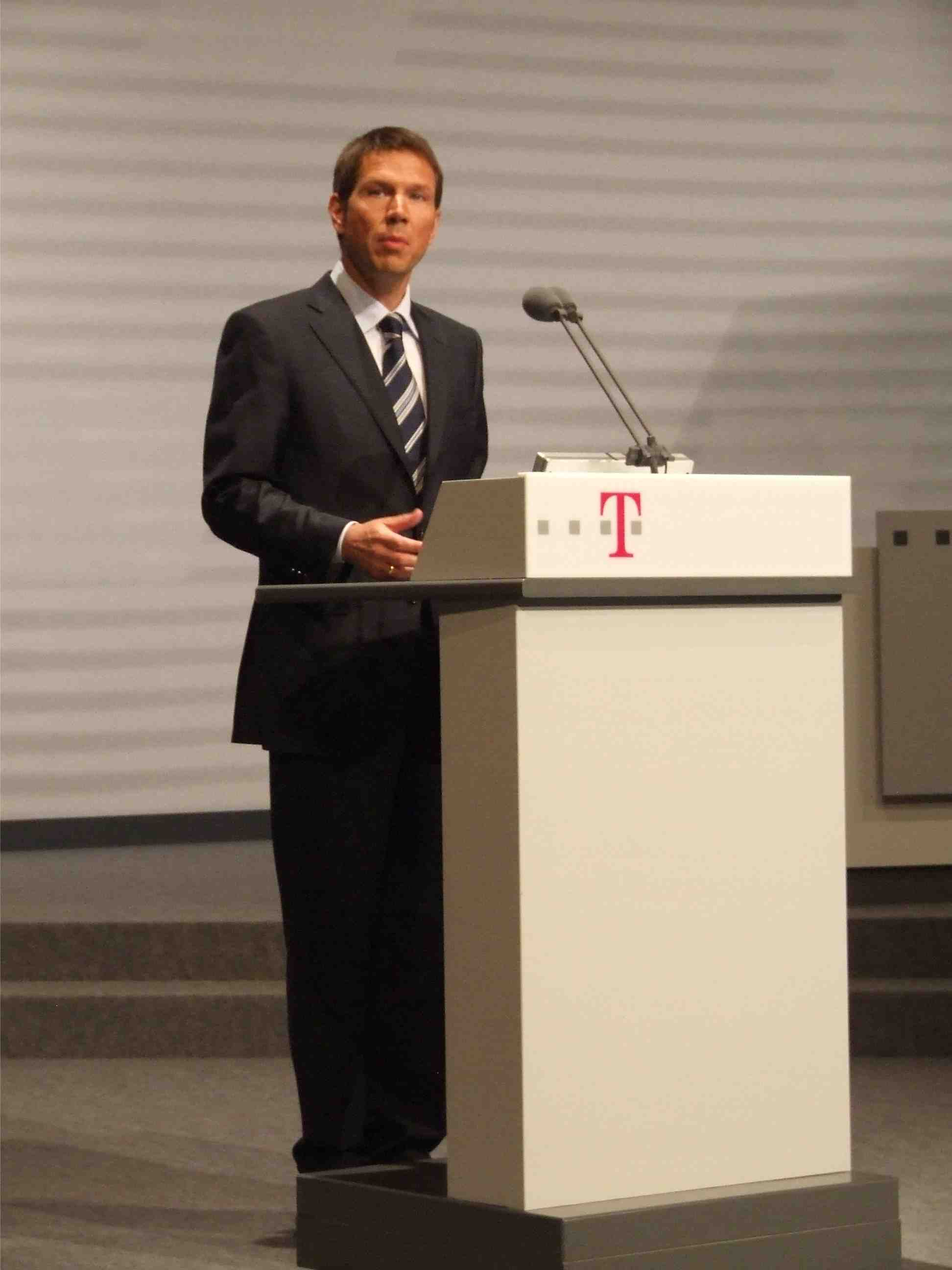 René Obermann Vorstandsvorsitzender der Deutschen Telekom AG auf der Hauptversammlung in der Kölnarena in Köln